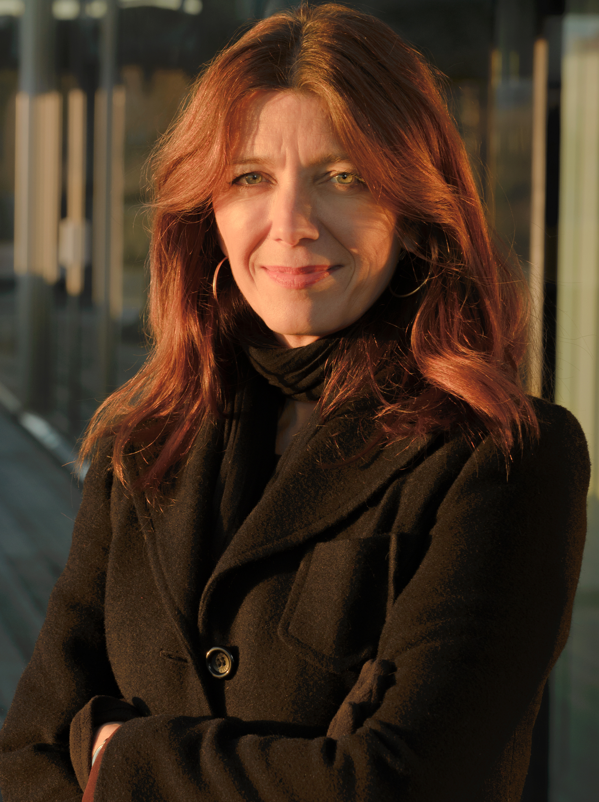 Anne-Cecilie Kaltenborn